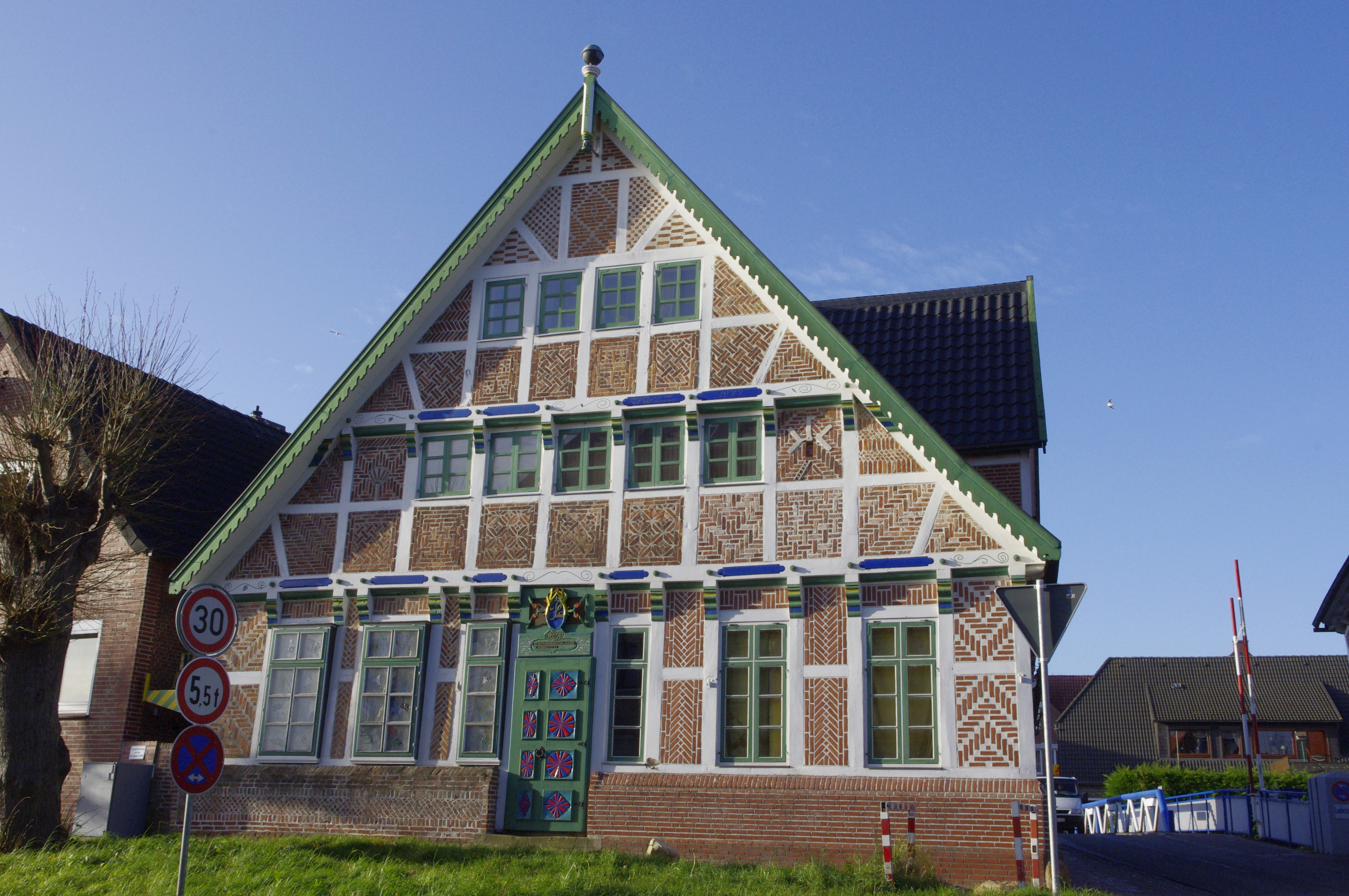 Fachwerkhaus in Moorende, Gemeinde Jork